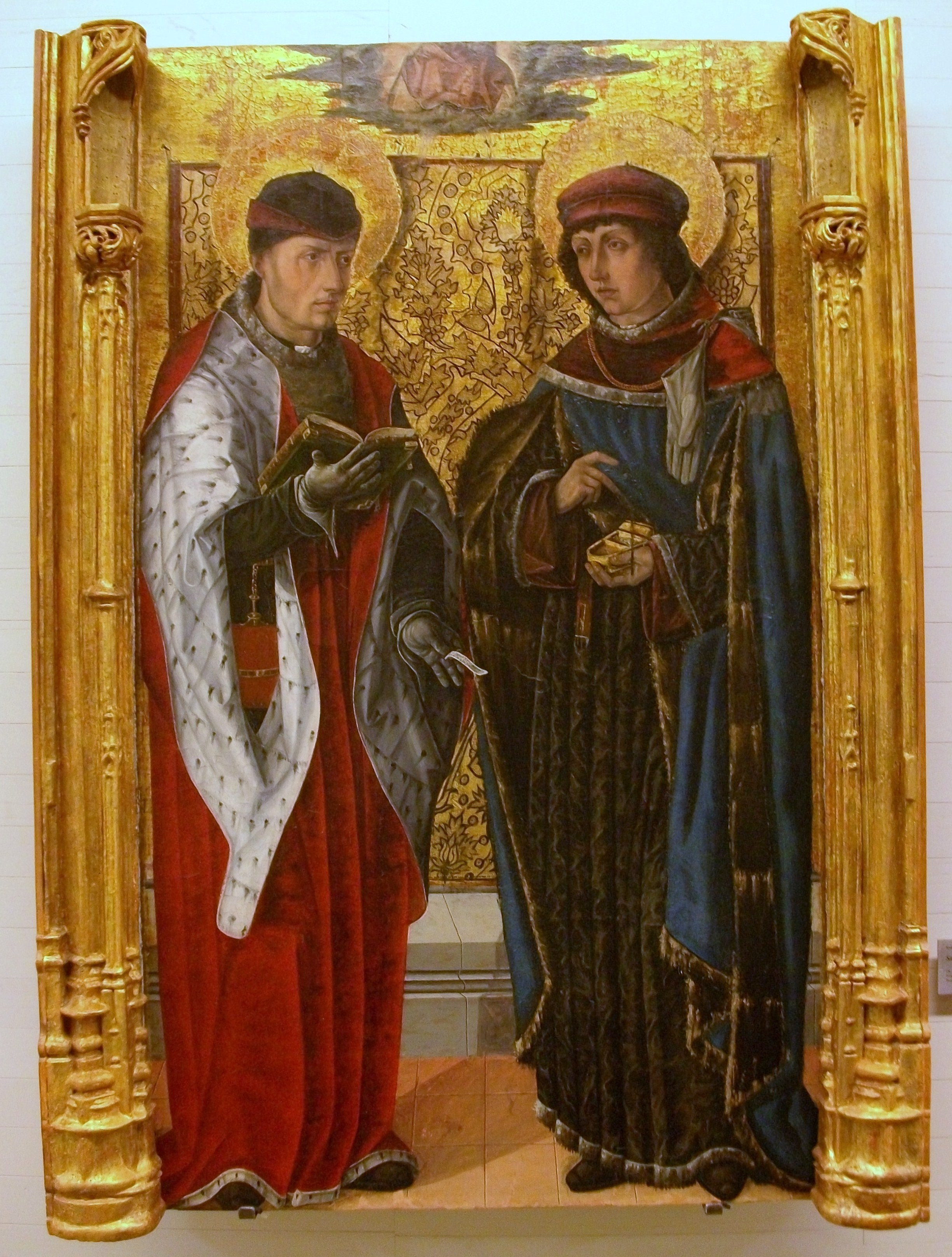 Sant Cosme i Sant Damià c. 1490, Roderic d'Osona (c. 1440-1518). Oli sobre taula, 139 x 80 cm. Museu de Belles Arts de Castelló.